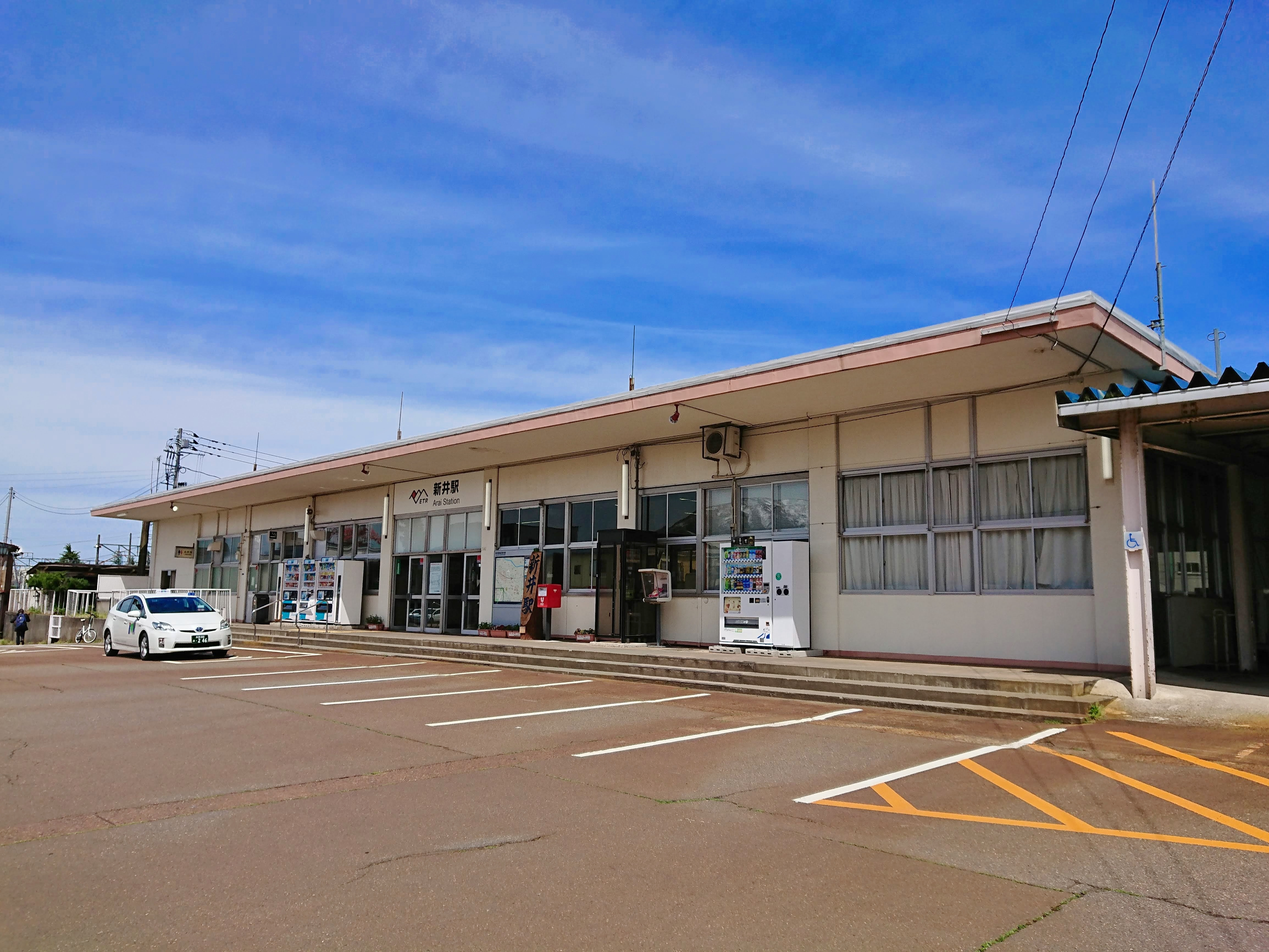 ETR新井駅の駅舎外観